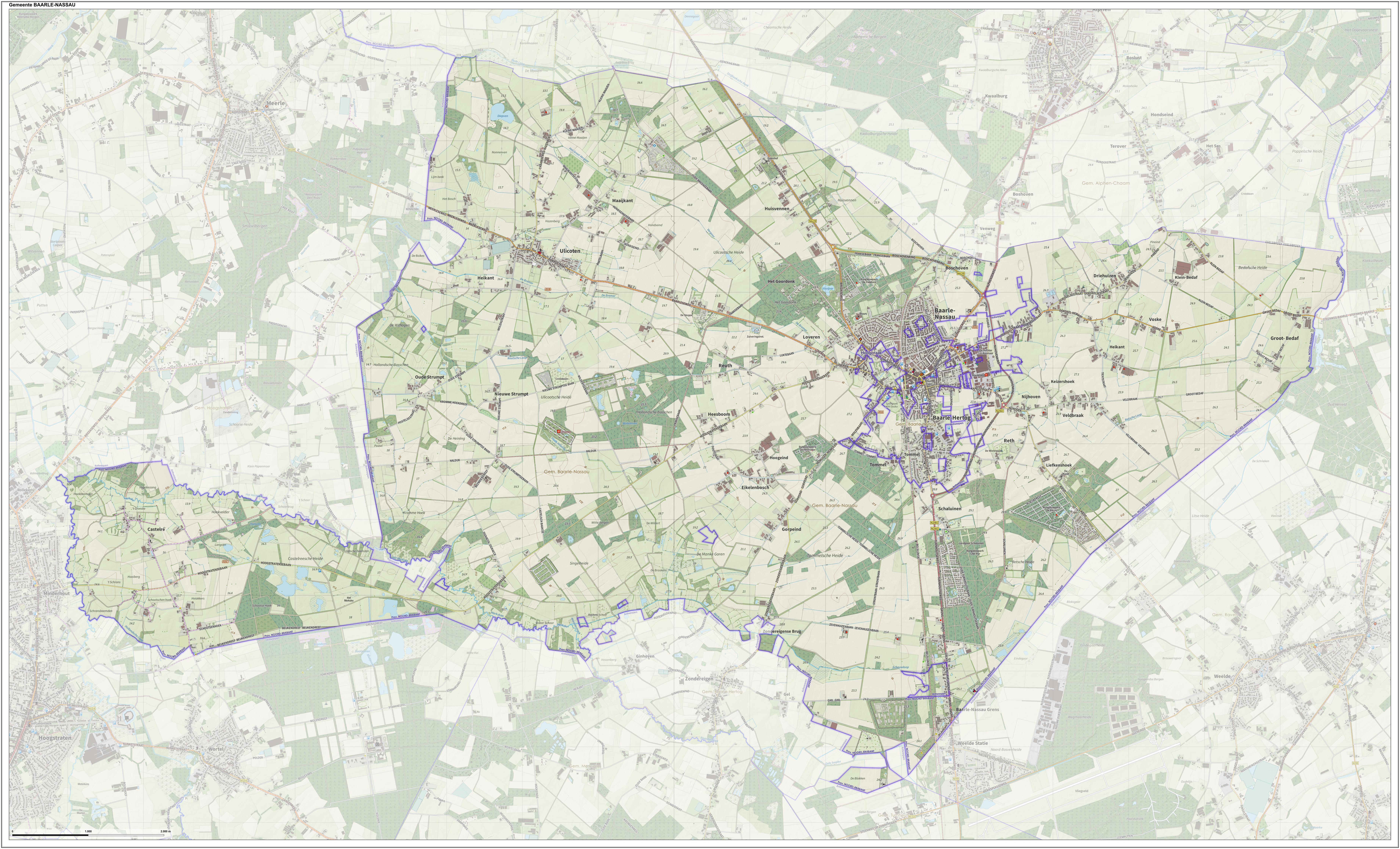 Topografische gemeentekaart. Resolutie: 400 pixels/km. Kaartbeeld samengesteld uit de open geodata van de Top10NL en Top25namen (Kadaster), Creative Commons-BY licentie. Gebouwvlakken uit open geodata BAG extract. Wegen uit de OpenStreetMap, OpenStreetMap community. Reliëfschaduw uit de Actuele Hoogtekaart AHN2. Samenstelling en kleurenschema: Jan-Willem van Aalst, met QGIS. Zie ook de Legenda.